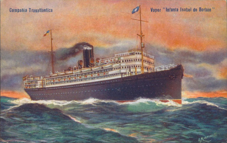 Vapor Infanta Isabél de Borbón de la Cª Transatlántica, España, 1913